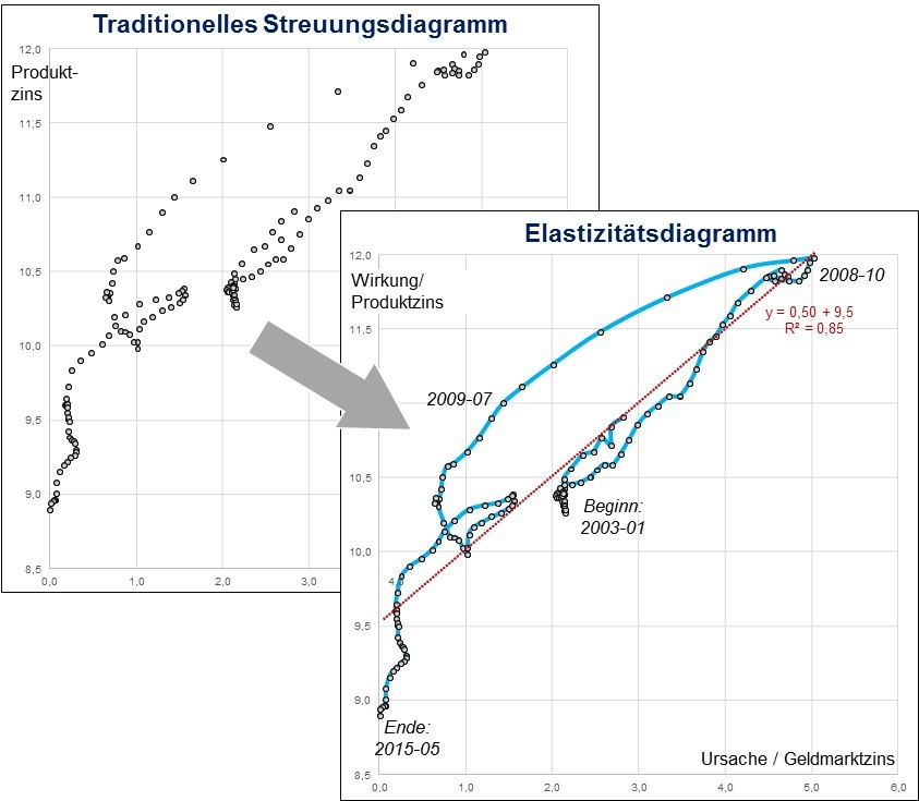 Vom Streidiagramm zum Elastizitätsdiagramm